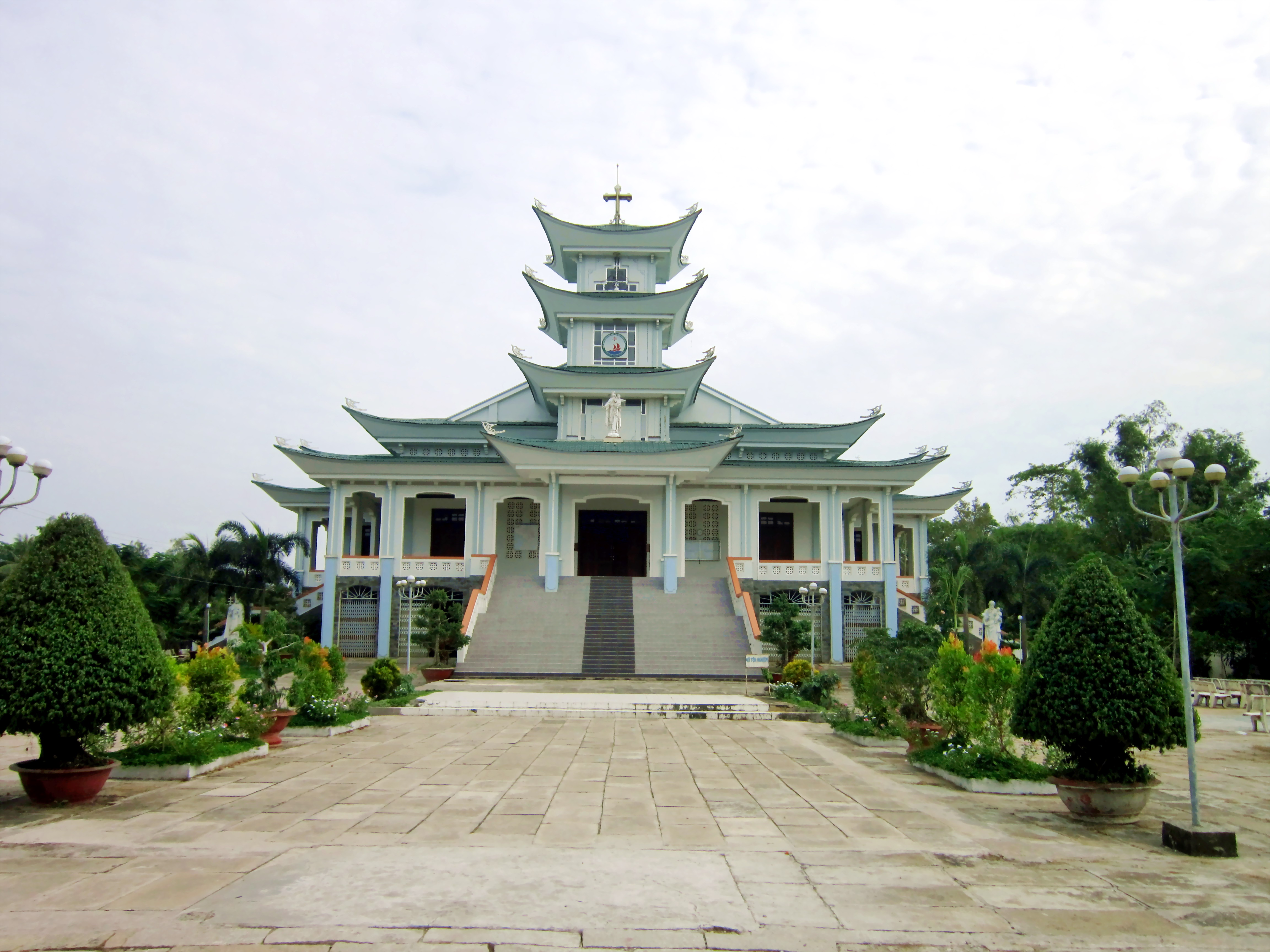 Nhà thờ Giáo xứ Môi Khôi ở xã Thạnh Quới, huyện Vĩnh Thạnh, TP Cần Thơ, Việt Nam.